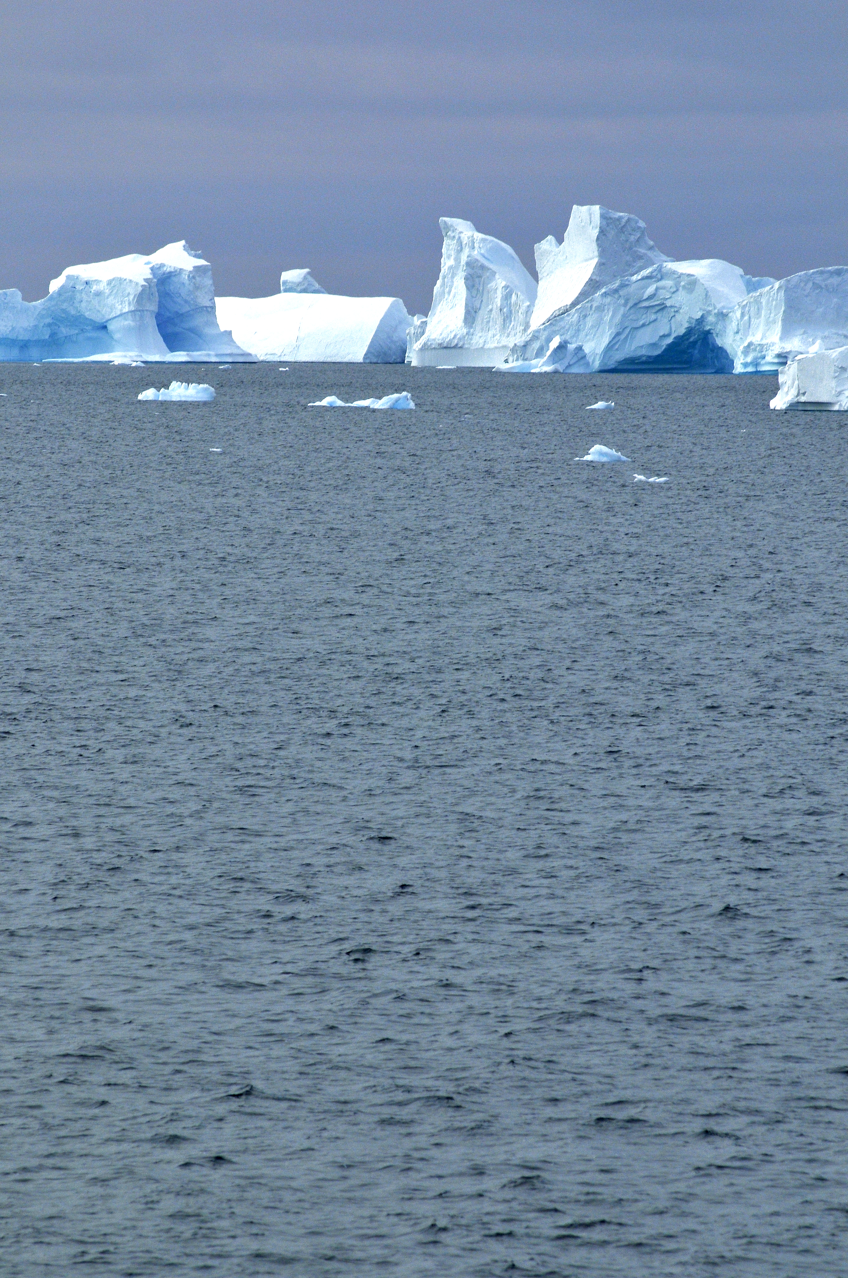 Icebergs en el Paso Francés (Antártida)